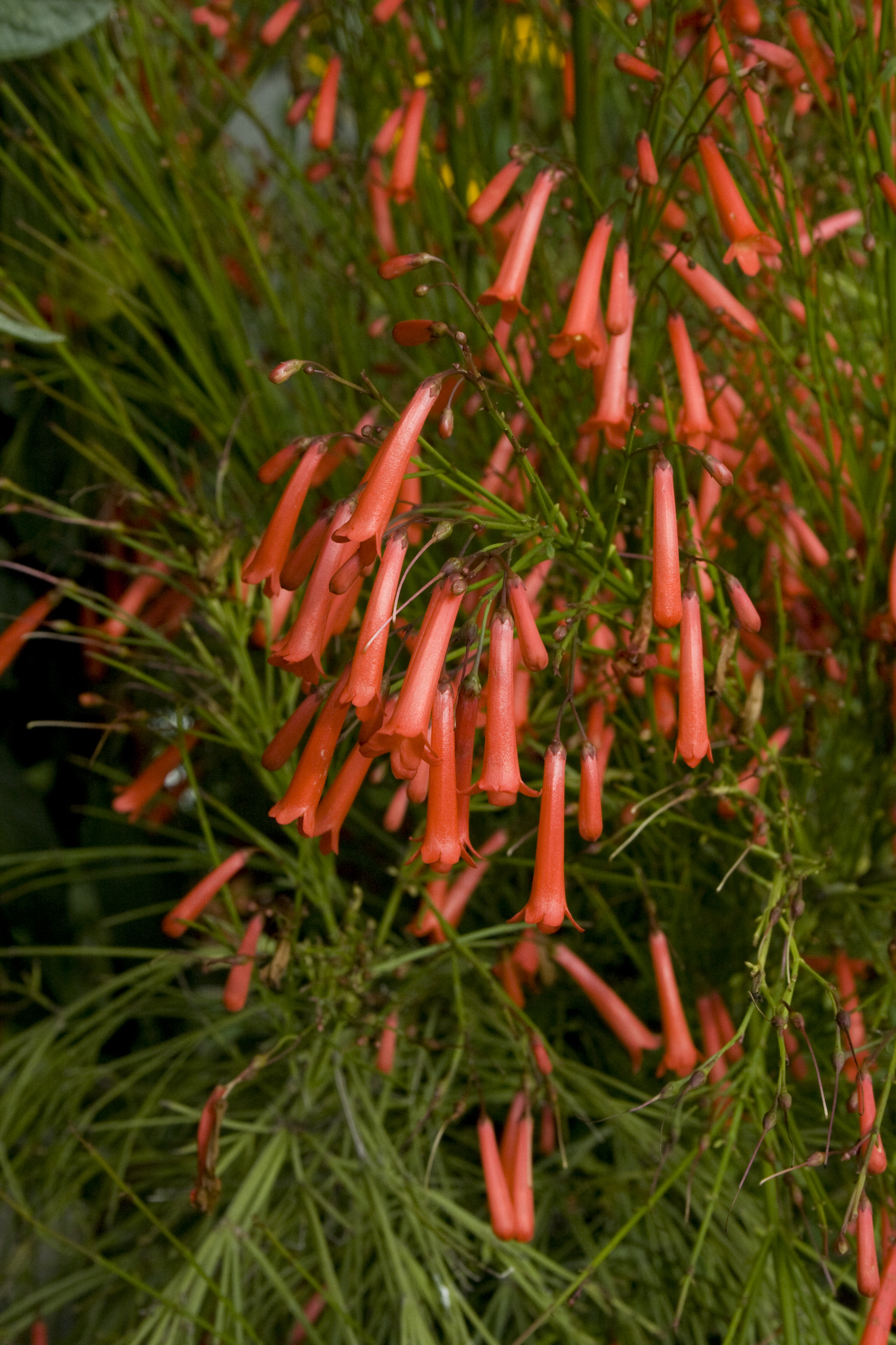 на снимке Russelia equisetiformis